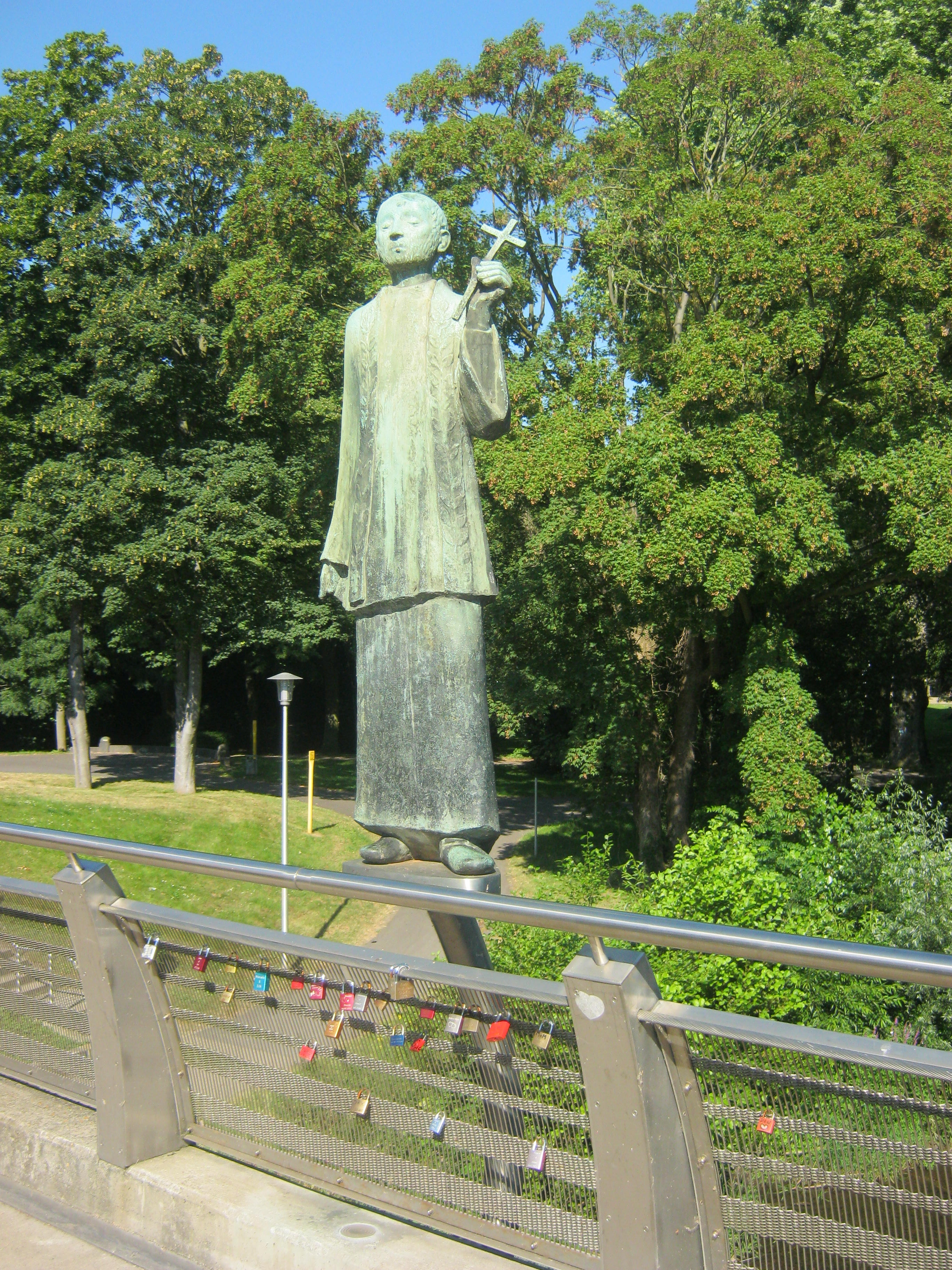 Johannesbrücke